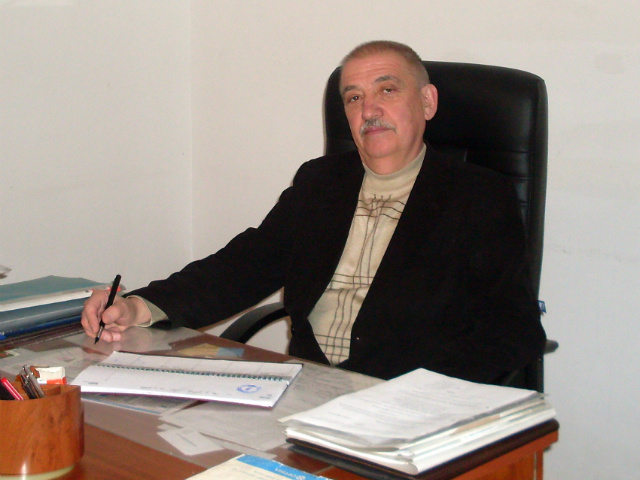 Перший директор НРЦ - Малюта Ярослав Миколайович